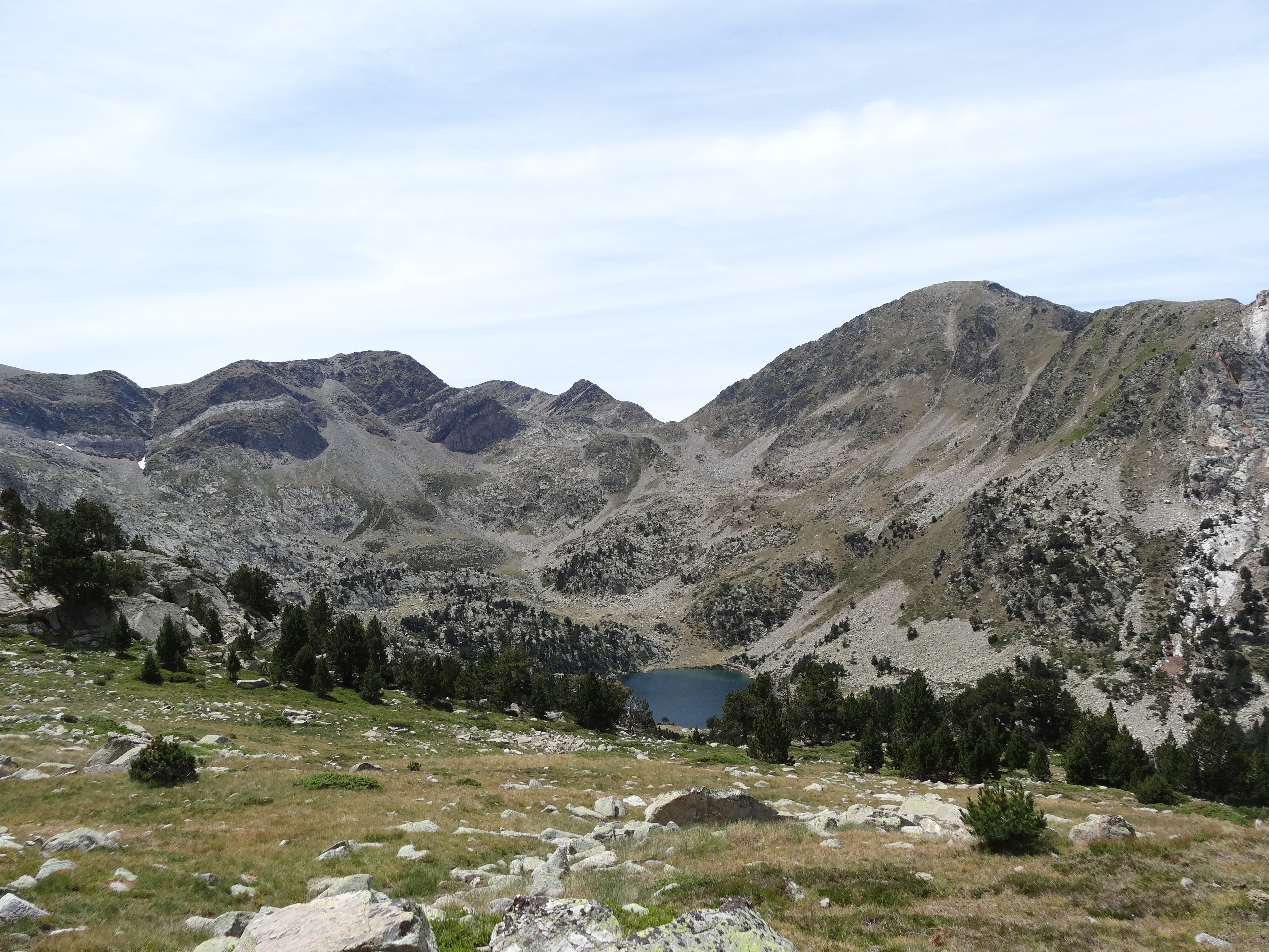 Fossa del Gegant, Pic del Racó Gors i Estany de les Truites (juliol 2012)